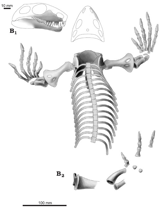 Callibrachion gaudryi Boule and Glangeaud, 1893 (Cisuralian, France).